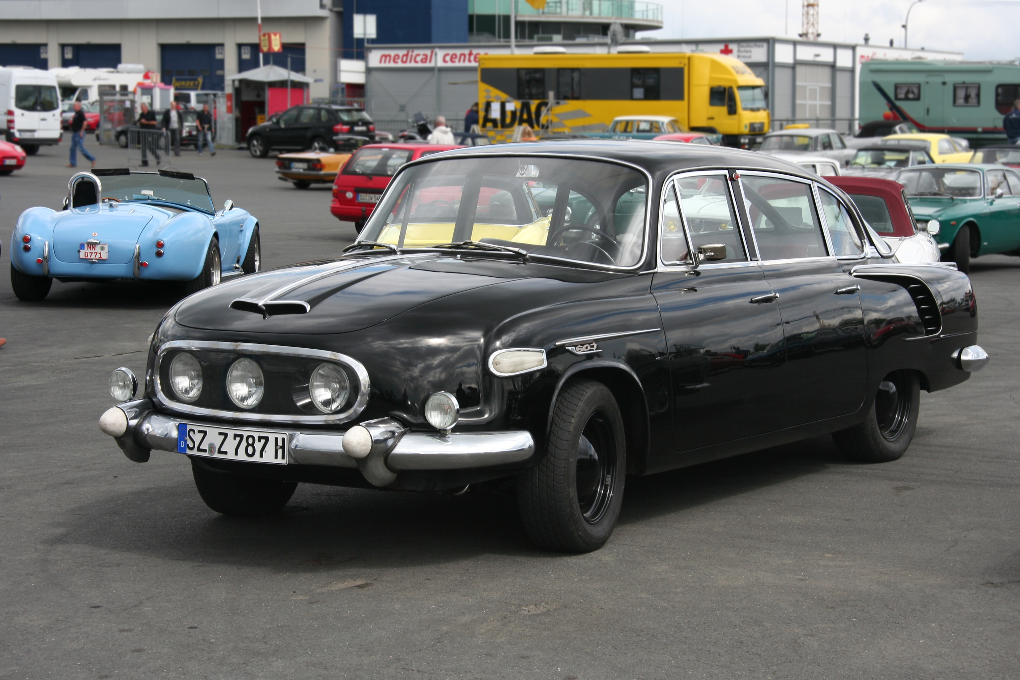 Tatra 603, Typ 1, beim Oldtimer Festival 2008 auf dem Fahrerlagerparkplatz des Nürburgrings. Kennzeichen des Fahrzeugs verändert.